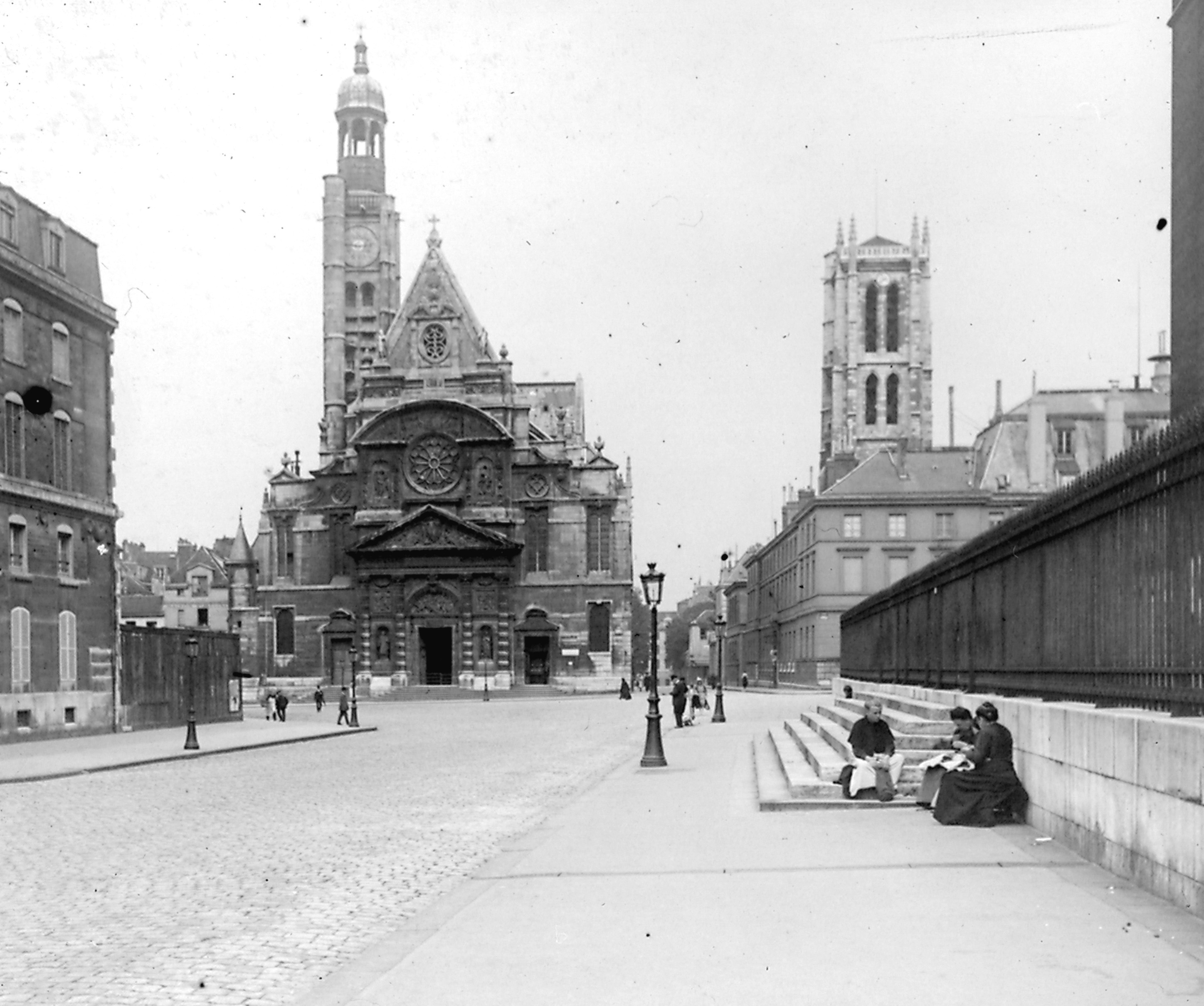 Paris - Eglise Saint Etienne du Mont - Photo prise par mon grand-père Maurice Terrien pendant la guerre de 14-18